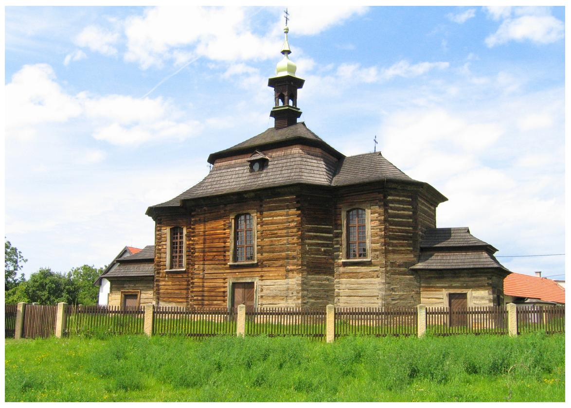 Loučná Hora (HK) ; roubený kostel sv. Jiří